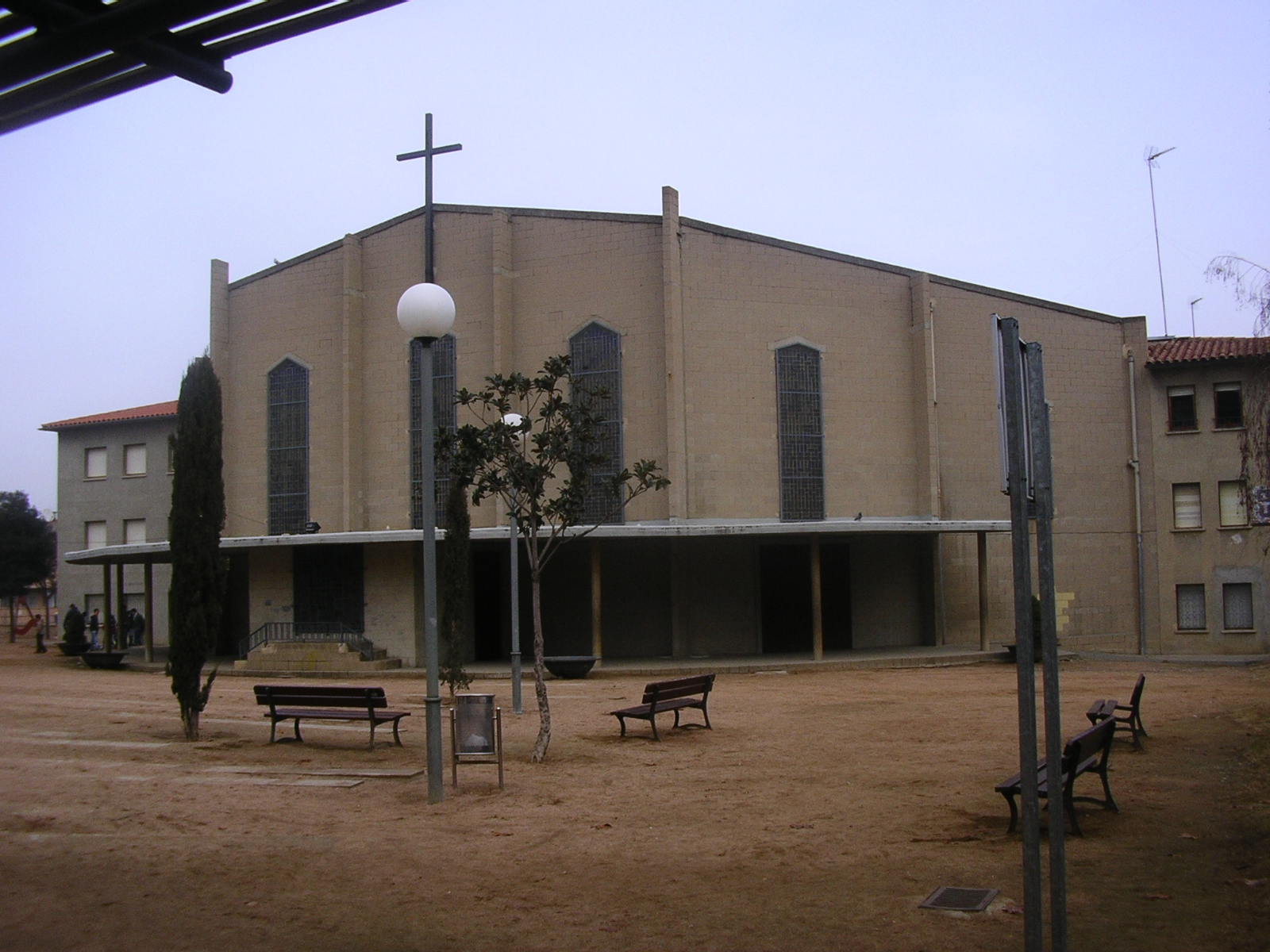 Manlleu, iglesia de Sant Pau